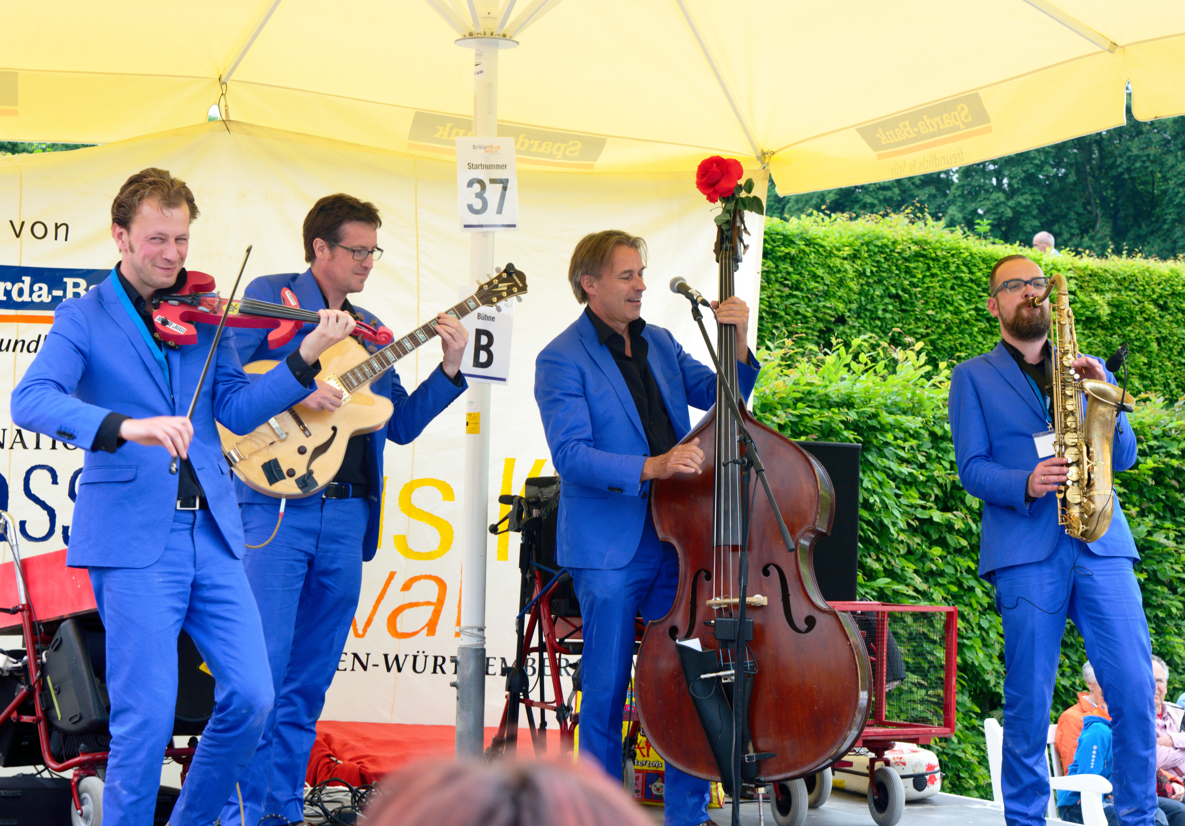 Die holländische Gruppe Busquitos beim Internationalen Musikfestival Baden-Württemberg 2015